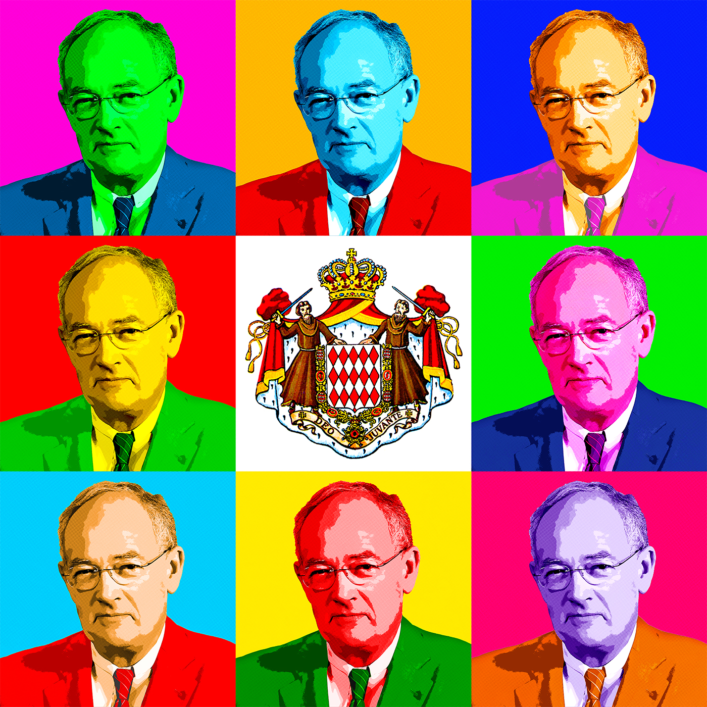 Michel Roger par Gil Zetbase Tableau Pop Art offert à la famille en Hommage à Michel Roger.